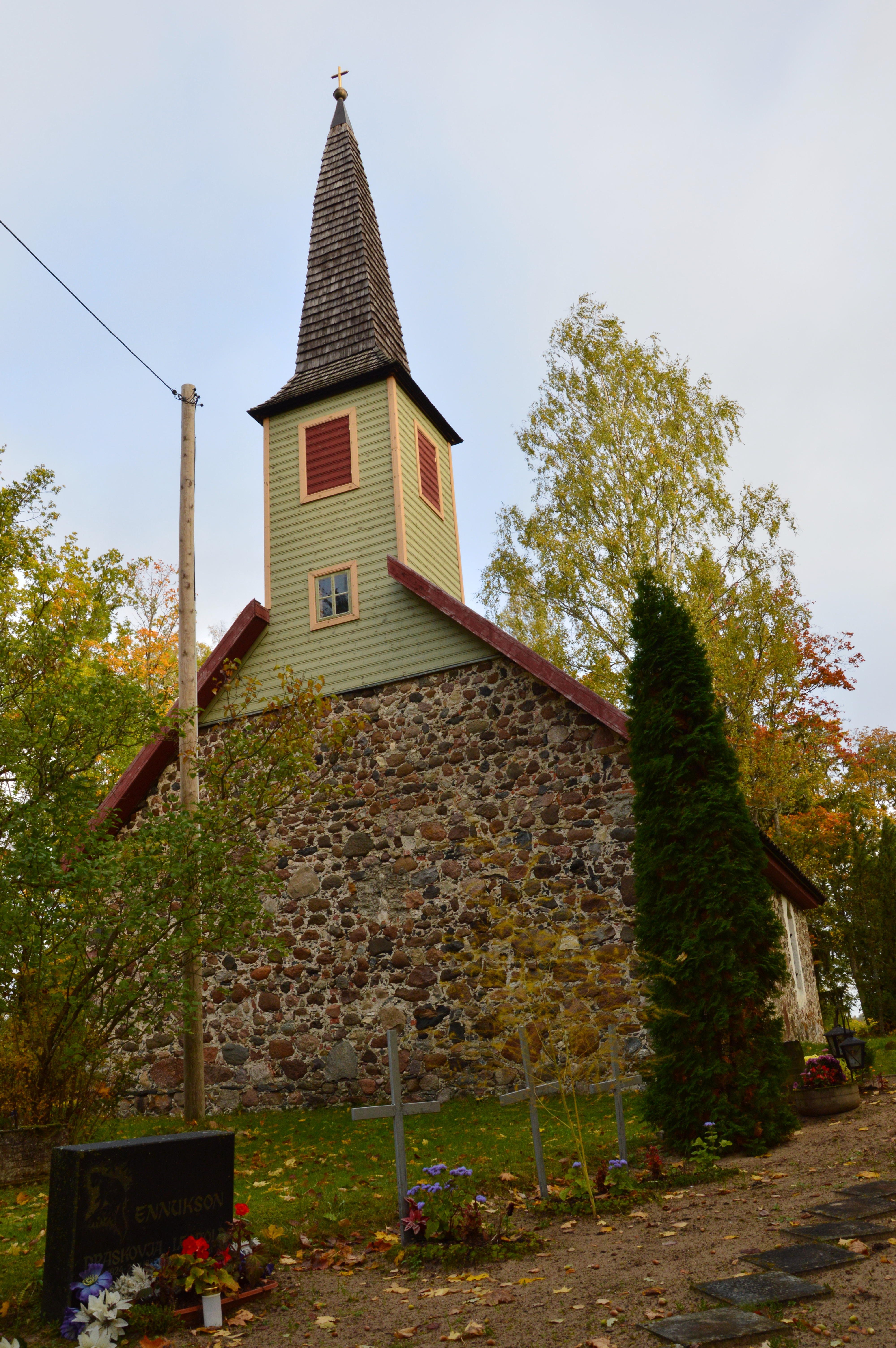 Lohusuu kalmistu kabel.